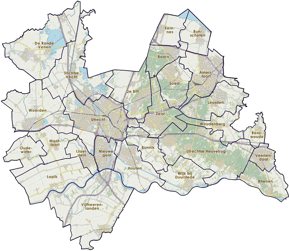 Uitgesneden overzichtskaart van de provincie, met indeling van gemeenten (2019) en impressie van het landschap.